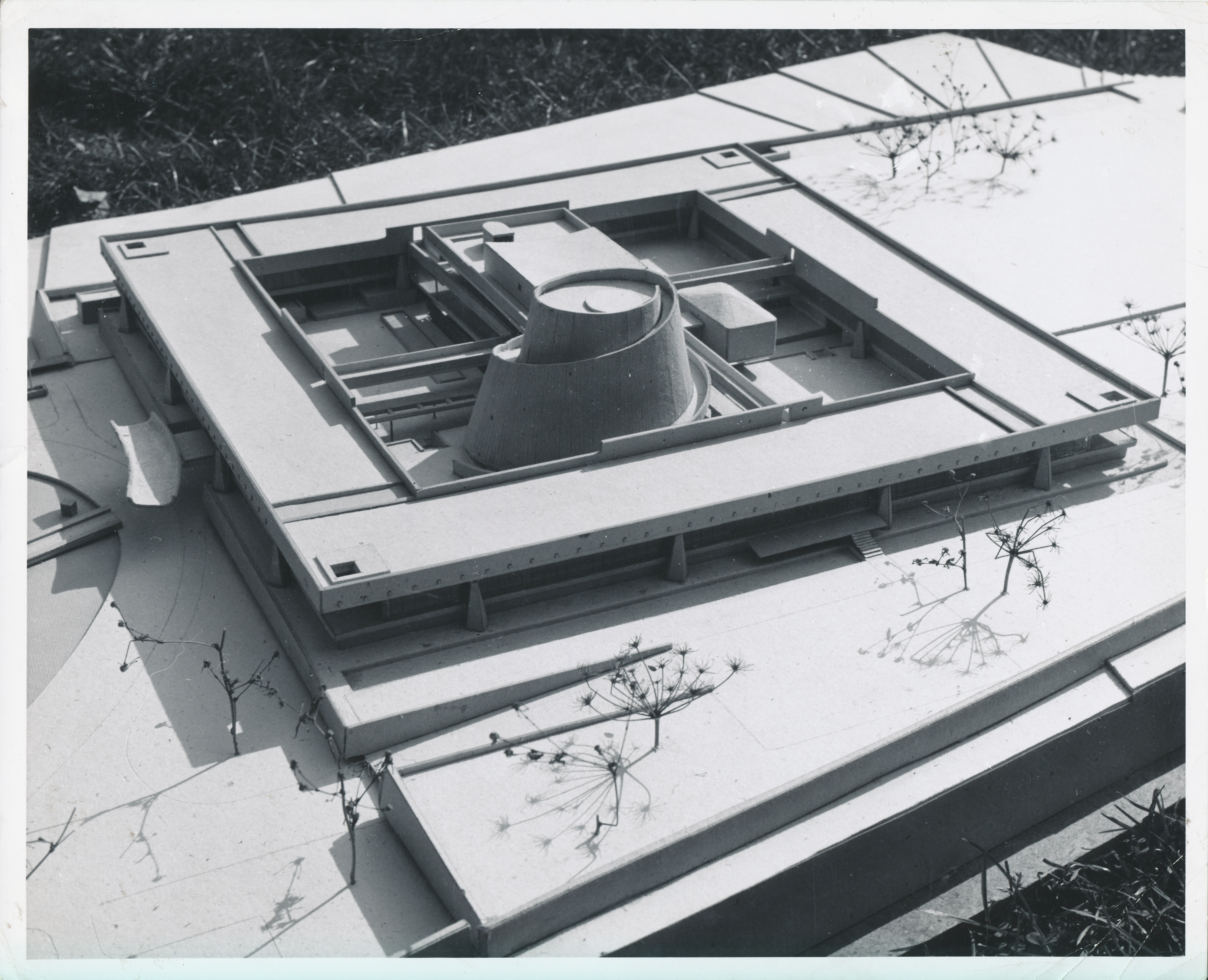 Maqueta donde se pueden apreciar los espacios centrales del edificio de la CEPAL en Santiago de Chile.